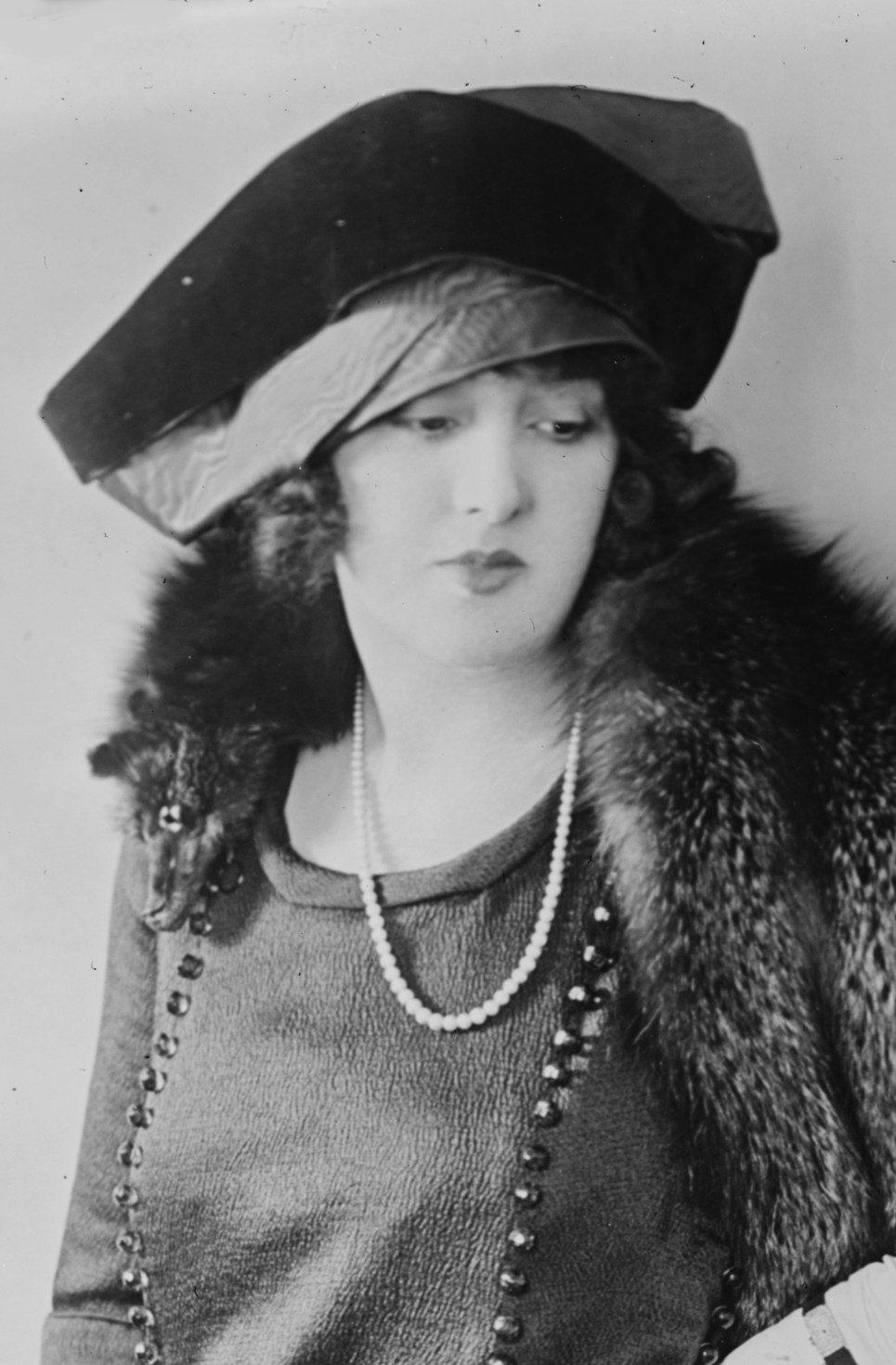 Actress Estelle Taylor